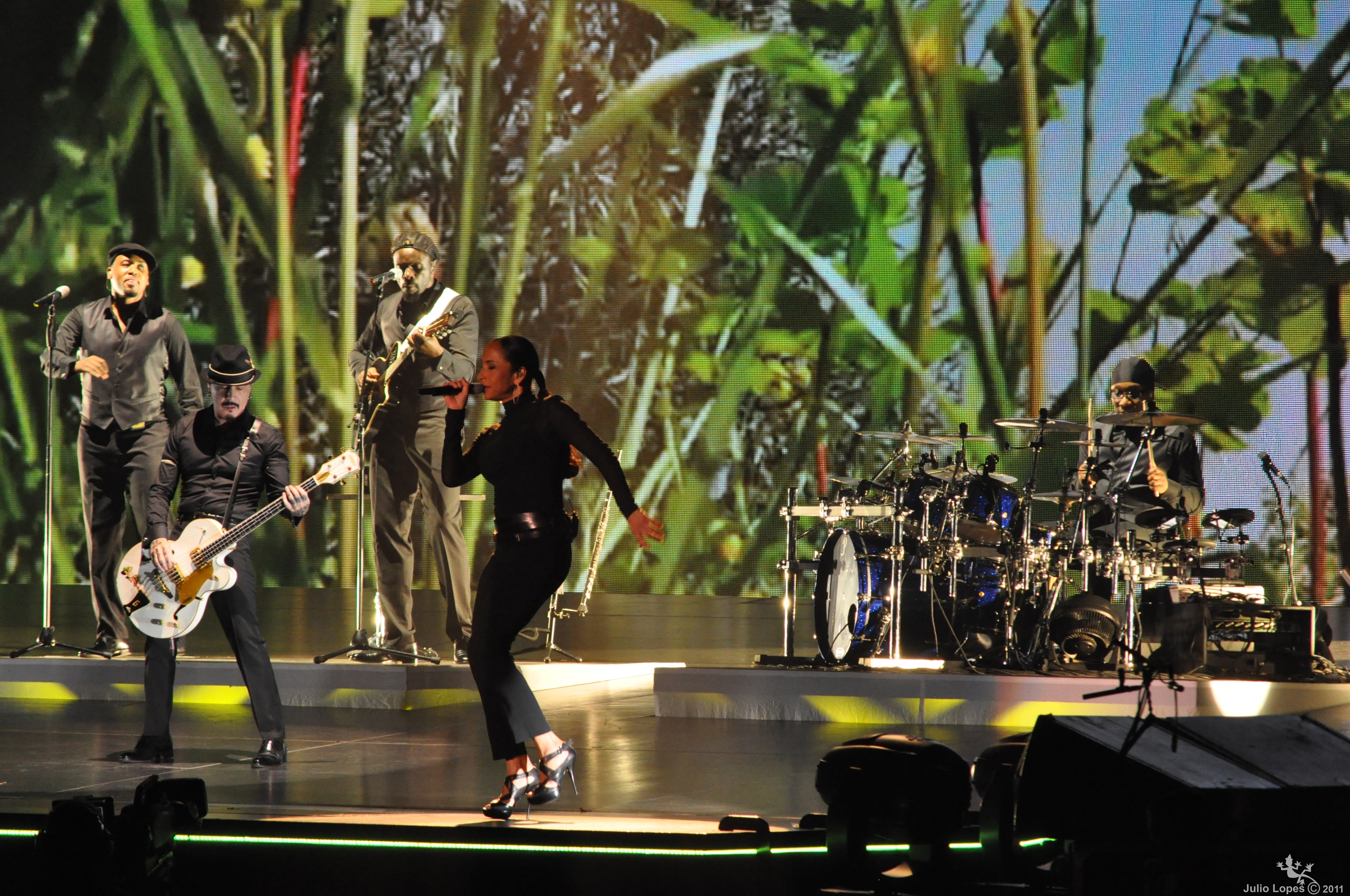 Show Sade Adu Brasília - Outubro 2011